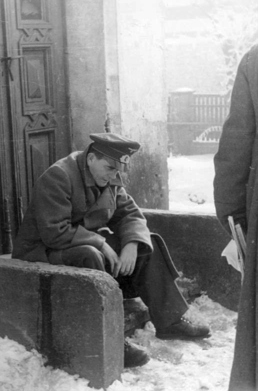 Albert Speer ADN-ZB/ Archiv Faschistisches Deutschland 1933-1945 Der faschistische Reichsminister für Rüstung und Kriegsproduktion, Albert Speer. [Albert Speer auf einer Treppe sitzend, Aufnahme etwa 1942- 1944, Winter] Abgebildete Personen: Speer, Albert Prof. Dr.: Reichsminister für Rüstung und Kriegsproduktion, Architekt, Deutschland (GND 118615998)